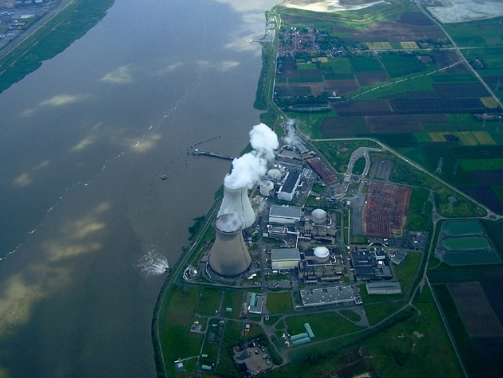 Luchtfoto Kerncentrale Doel